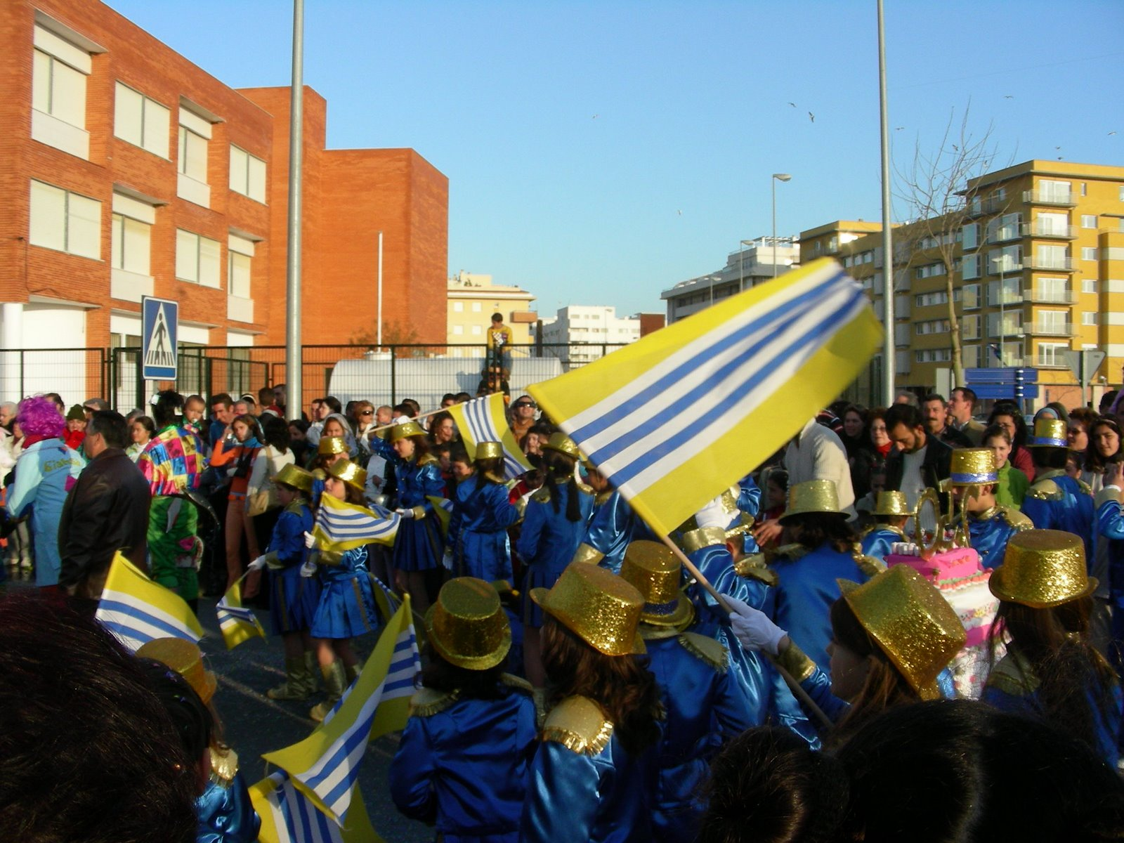 Comparsa desfilando en la cabalgata del carnaval de Isla Cristina.